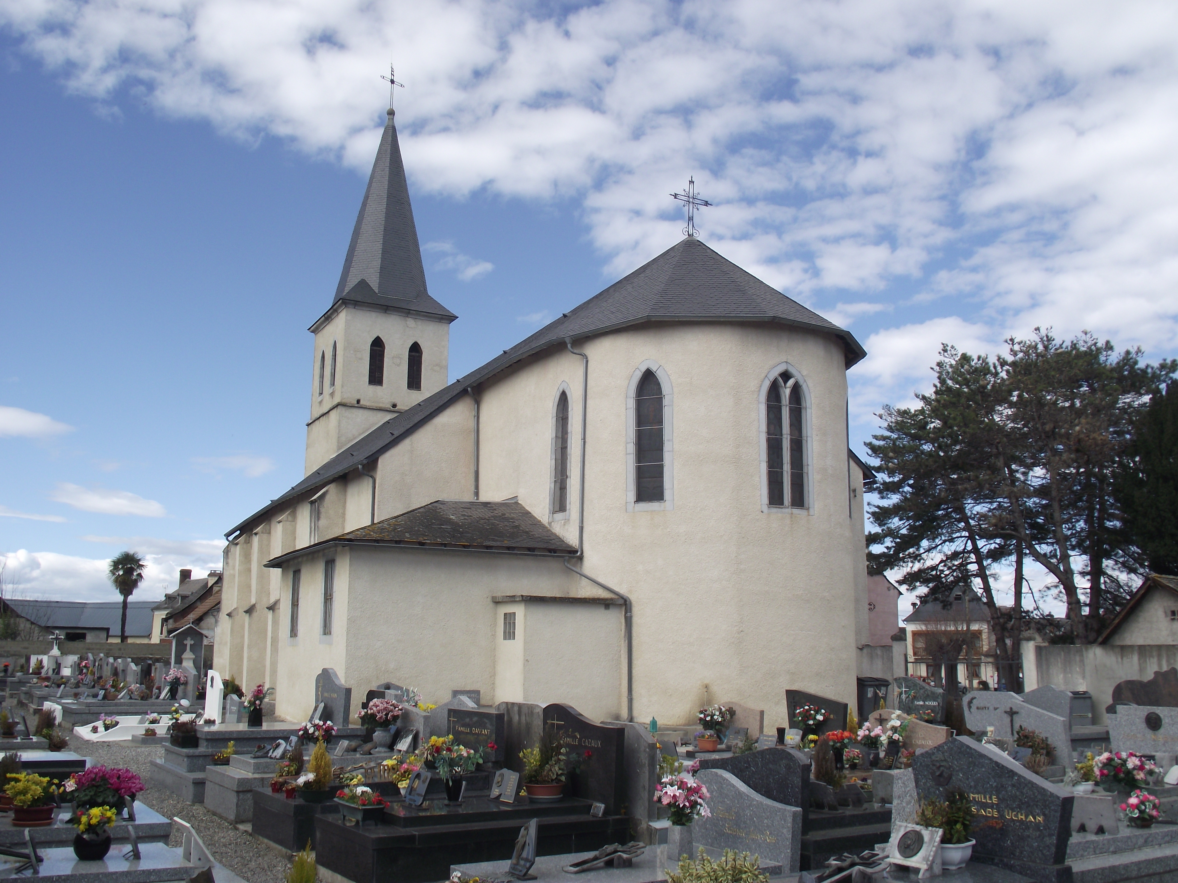 Église Saint-Christophe de Momères (65)